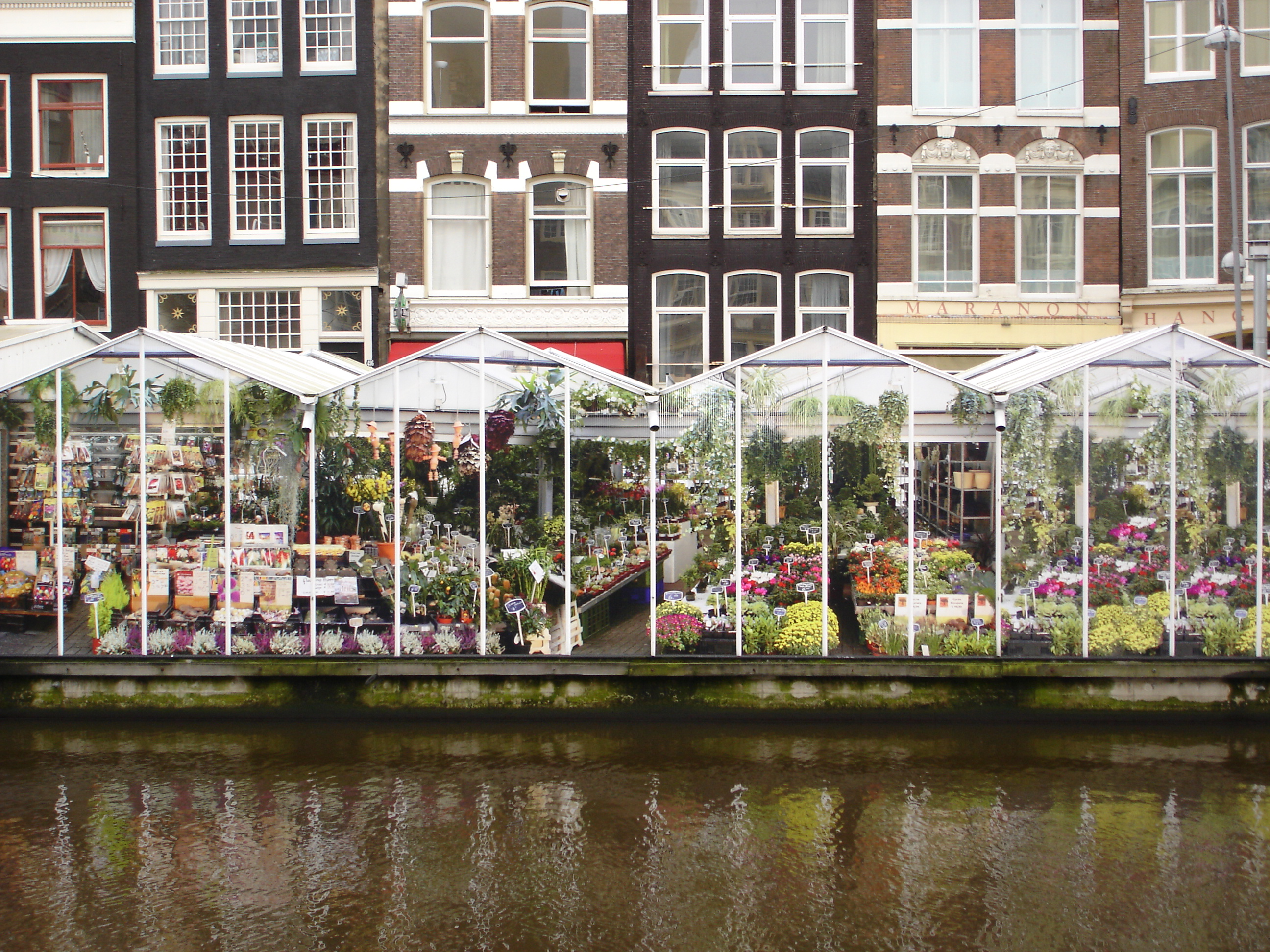 Marché aux fleurs Amsterdam